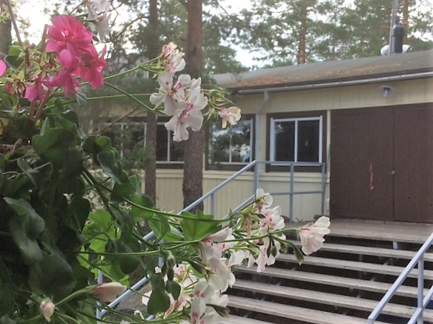 Mahnalan lava